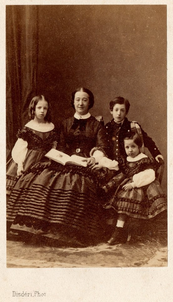 Fotografie rodiny vévody Jakuba z Alby.